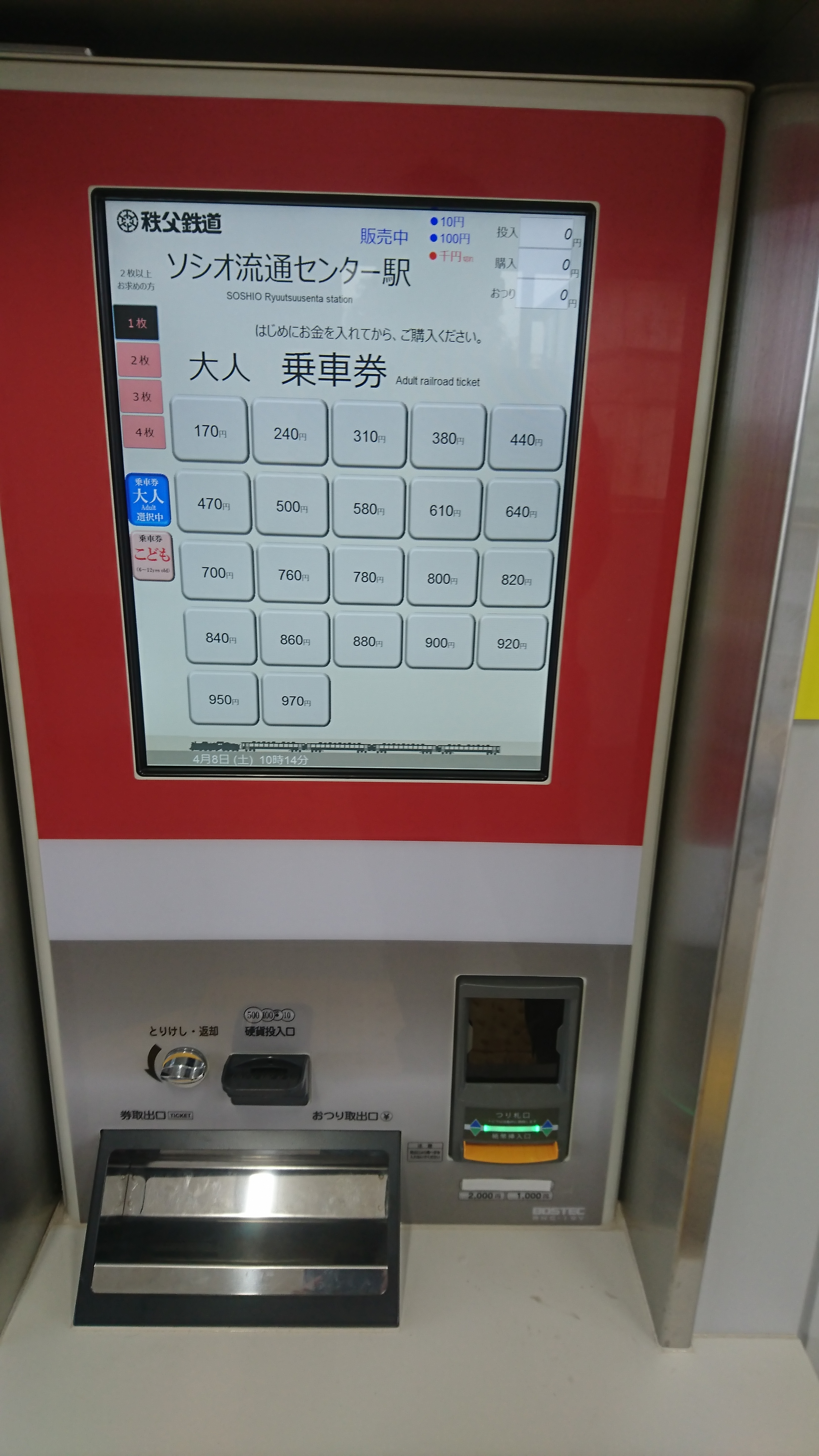 ソシオ流通センター駅自動券売機